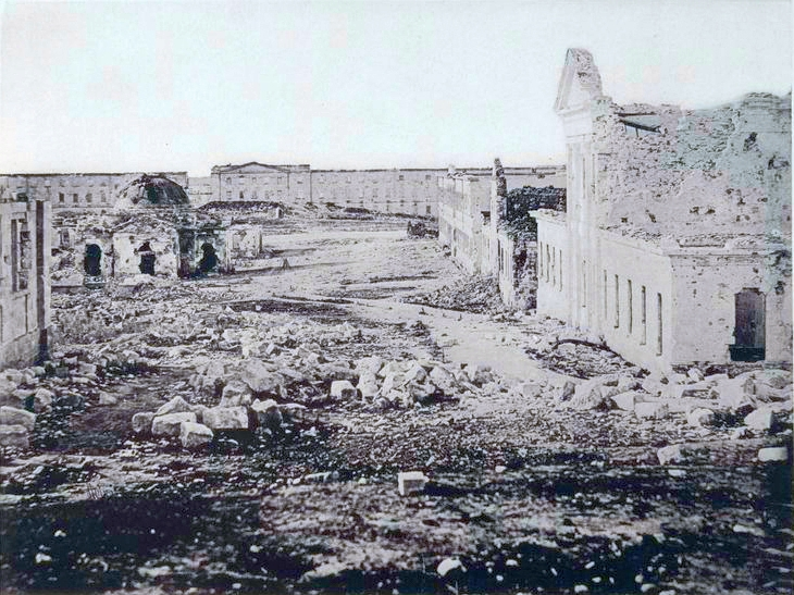 Крымская война 1853—1856. Казармы.